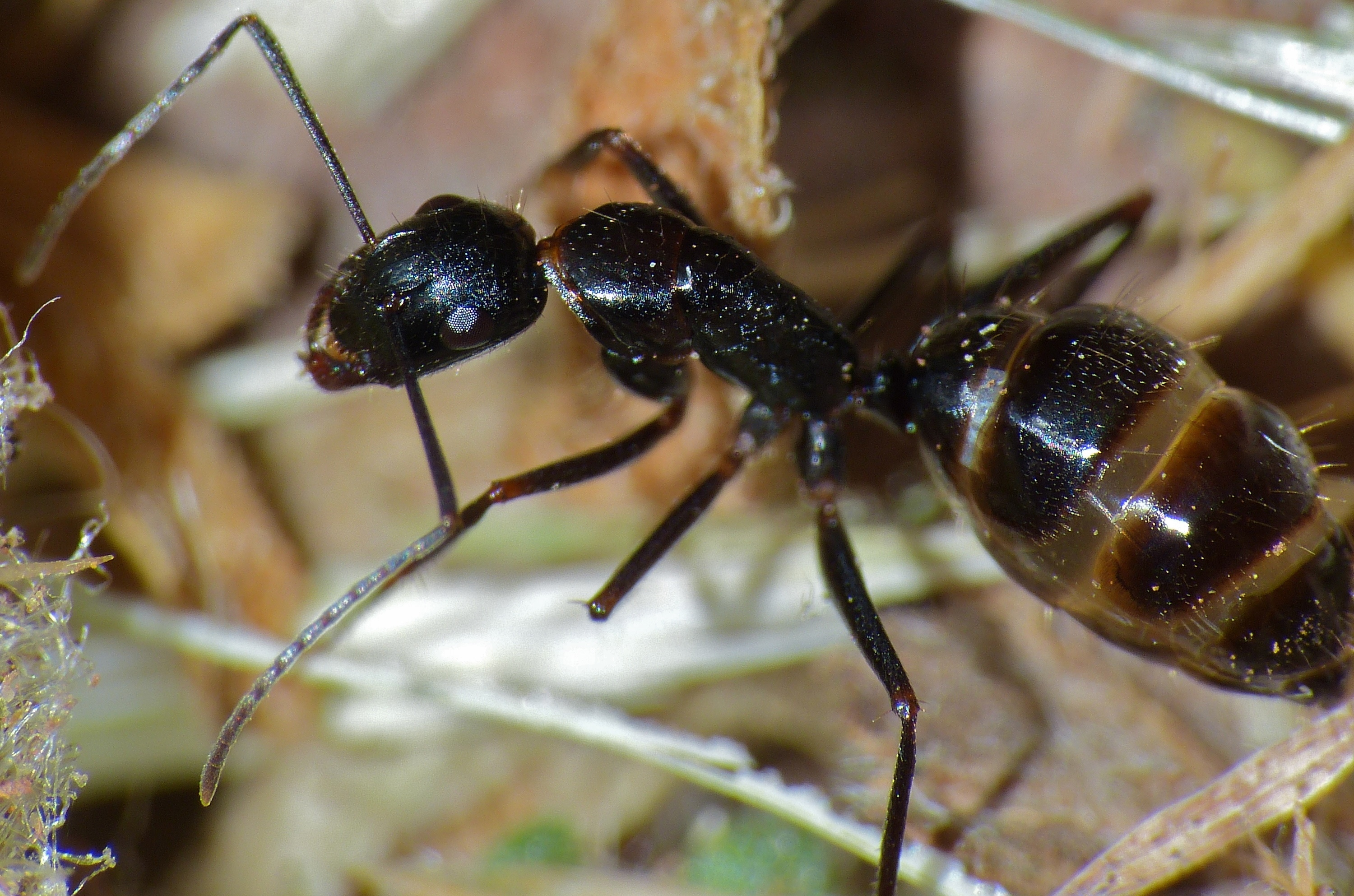 Lac du Salagou, Clermont-l'Hérault, Hérault, FRANCE